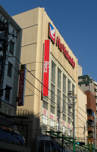 ザ・プライス北千住店外観